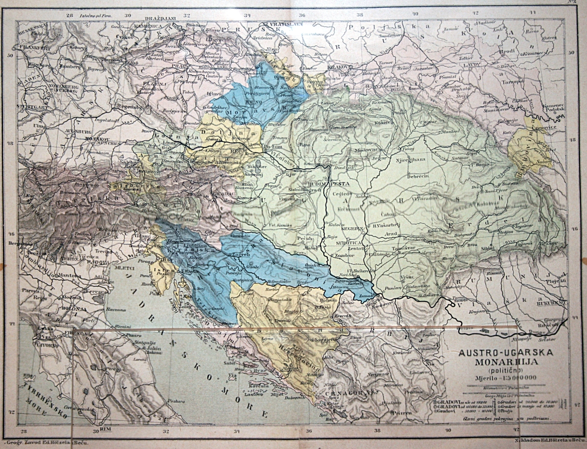 Kozenov školski atlas, B. Kozenn, A. Dobrilović, Beč, 1887. godine, snimljeno tijekom Noći muzeja